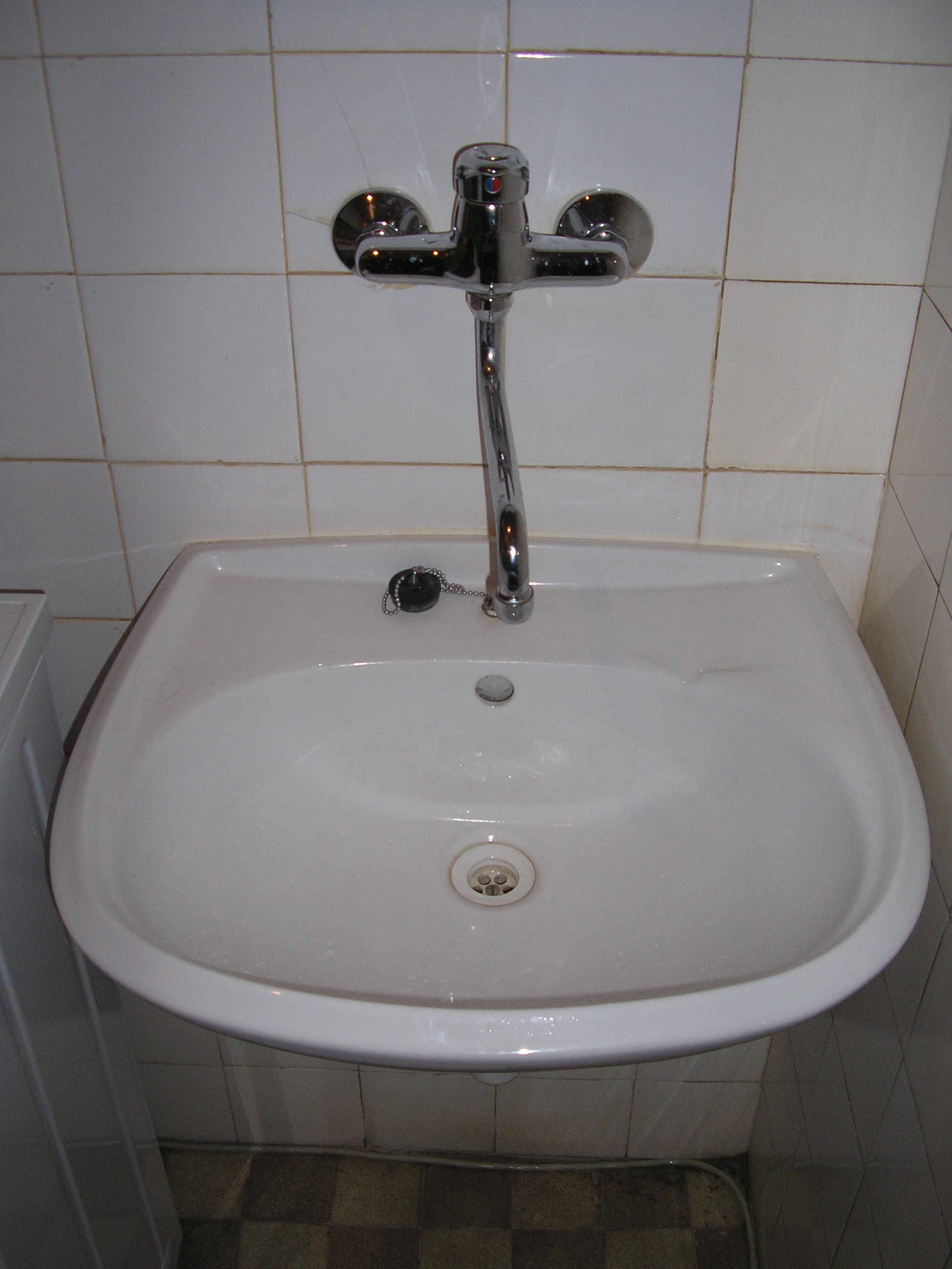 Umyvadlo